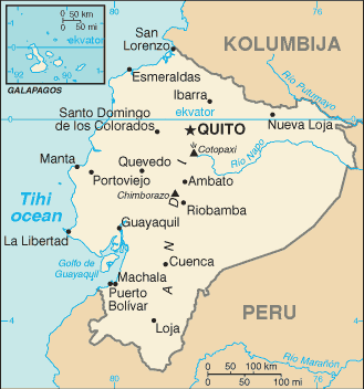 Položaj Ekvadorja.